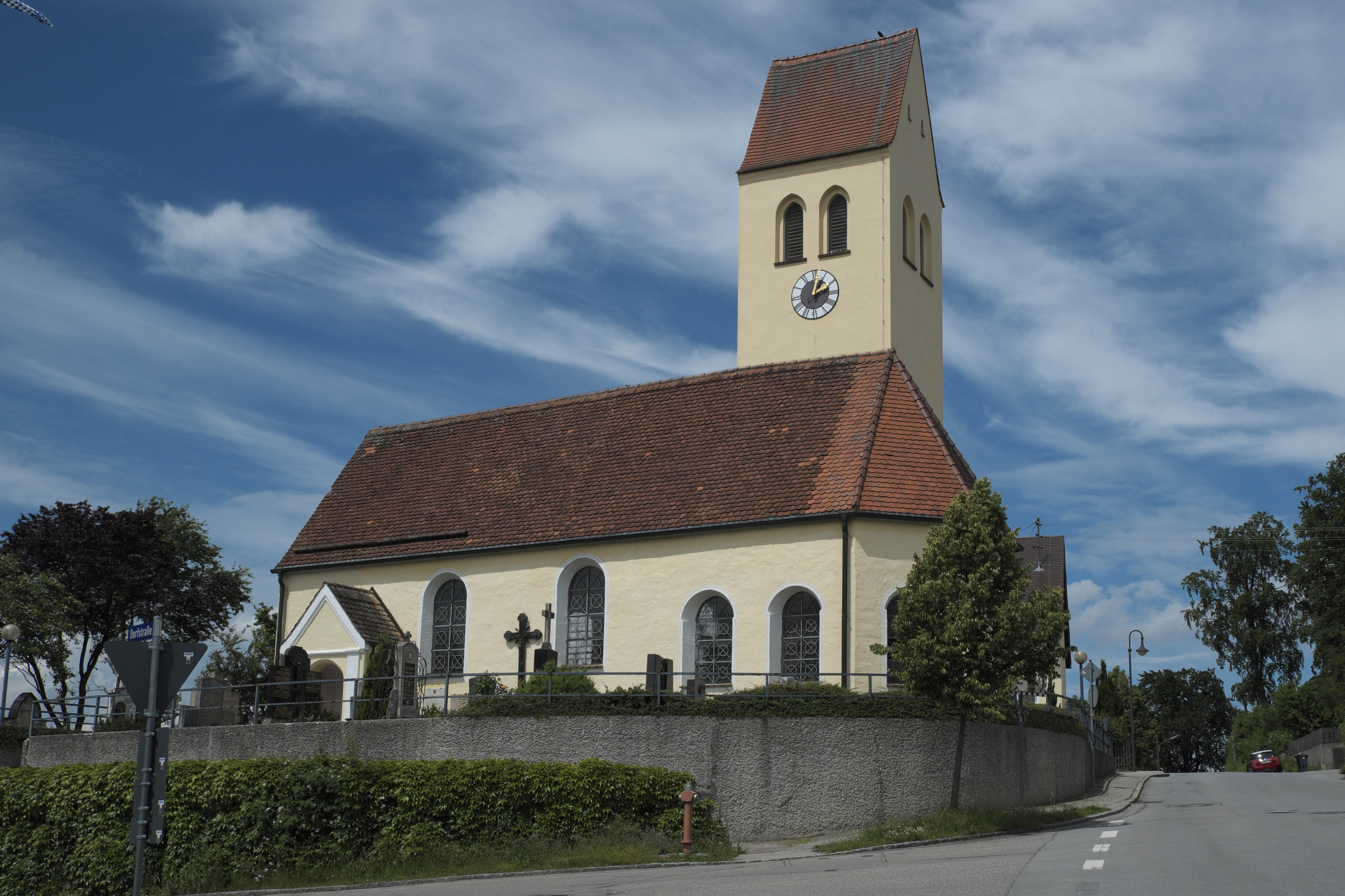 Katholische Filialkirche St. Martin in Steinebach am Wörthsee, einem Gemeindeteil von Wörthsee im Landkreis Starnberg (Bayern/Deutschland)